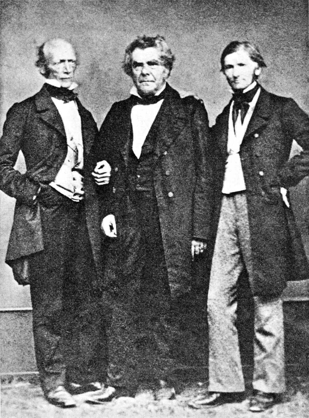 Von links: Arnold Escher von der Linth, Professor für Geologie in Zürich, Peter Merian, Professor für Physik, Chemie, Geologie und Paläontologie in Basel und Oswald Heer, Professor für Naturwissenschaften in Zürich. Daguerreotyp vor 1872.